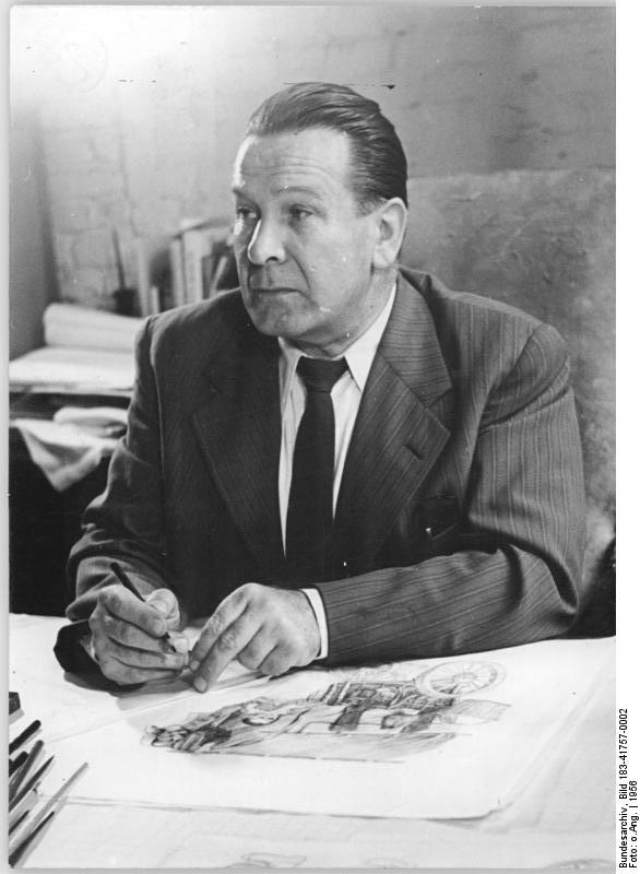 Karl v. Appen ADN-ZB Karl von Appen, Bühnenbildner geb. 12.5.1900 in Düsseldorf, (handschriftlich nachträglich ergänzt: gest. 22.8.1981) ist seit 1954 Chefbühnenbildner des Berliner Ensembles; Mitglied der Akademie der Künste der DDR. [Porträt Karl von Appen am Schreibtisch mit Zeichnungen] Abgebildete Personen: Appen, Karl von Prof.: Chefbühnenbildner des Berliner Ensembles, Akademie der Künste (AdK)), DDR